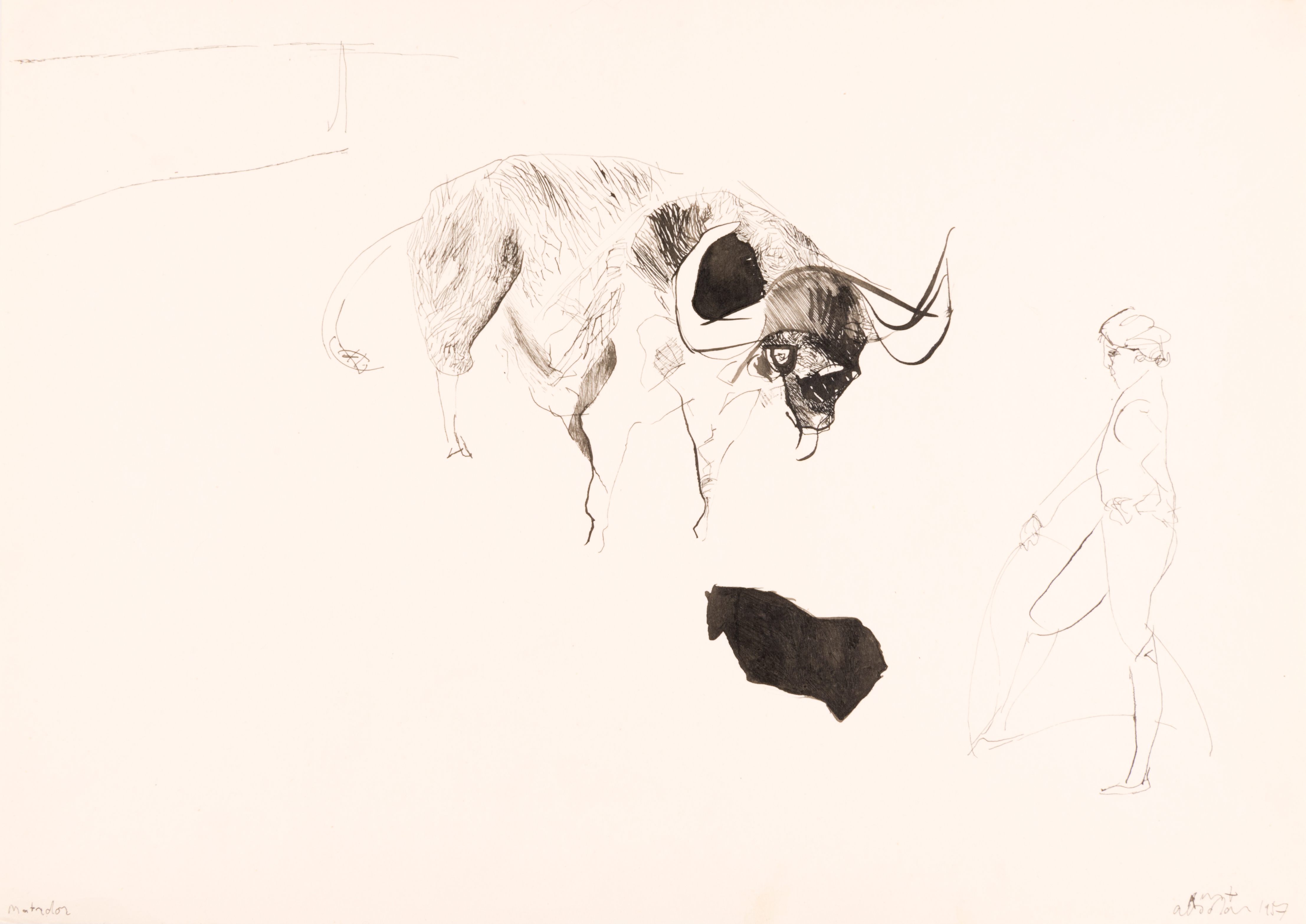 Zeichnung